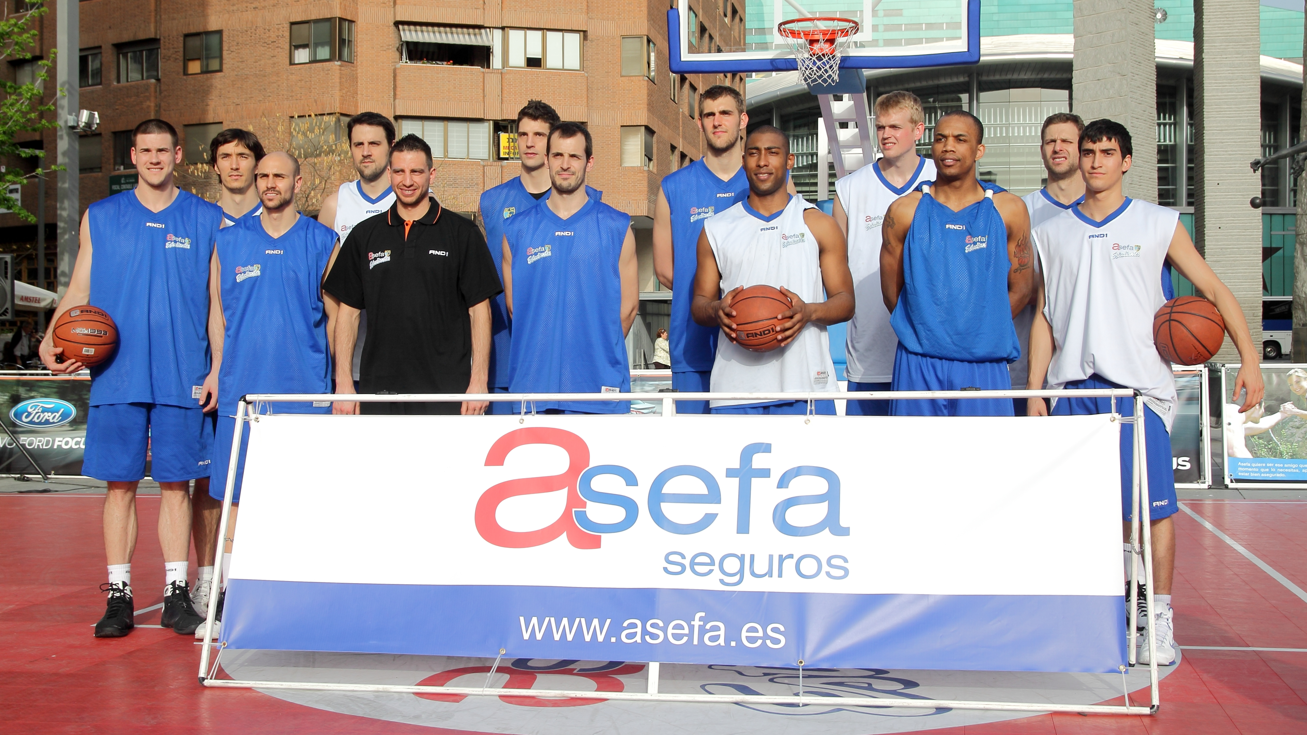 Equipo ACB de Asefa Estudiantes, temporada 2010-2011. La foto está tomada al finalizar la exhibición que dio el equipo en la Avenida de Felipe II, Madrid el 7 de abril de 2011. De izquierda a derecha: Nik Caner-Medley, Jiří Welsch, Albert Oliver, Germán Gabriel, Sergio Sánchez, Josh Asselin, Marc Blanch, Yannick Driesen, Jayson Granger, Daniel Clark, Tyrone Ellis, Hernán Jasen, Jaime Fernández.